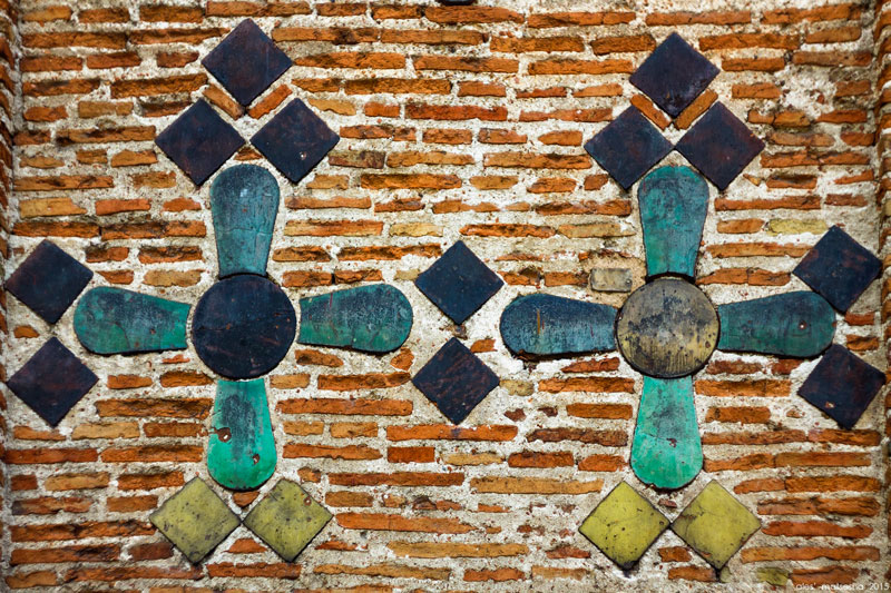 Гродна. Каложа. Дэталь